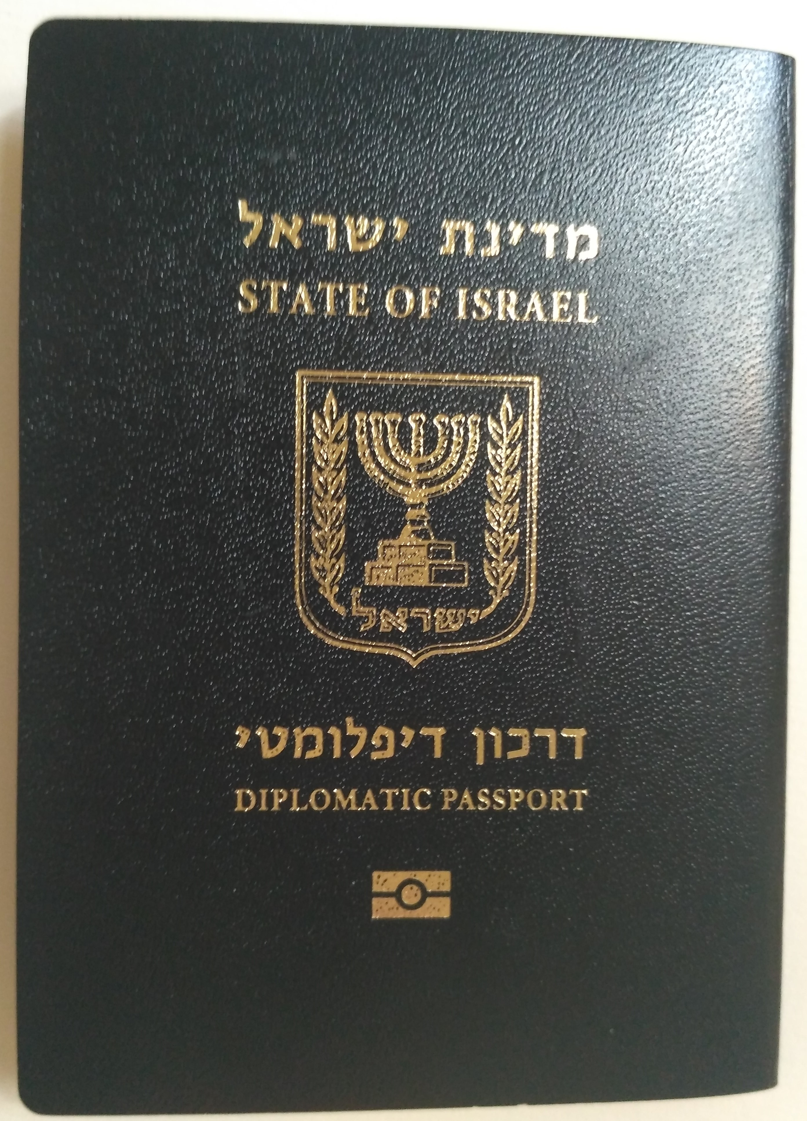 דרכון דיפולמטי ישראלי ביומטרי